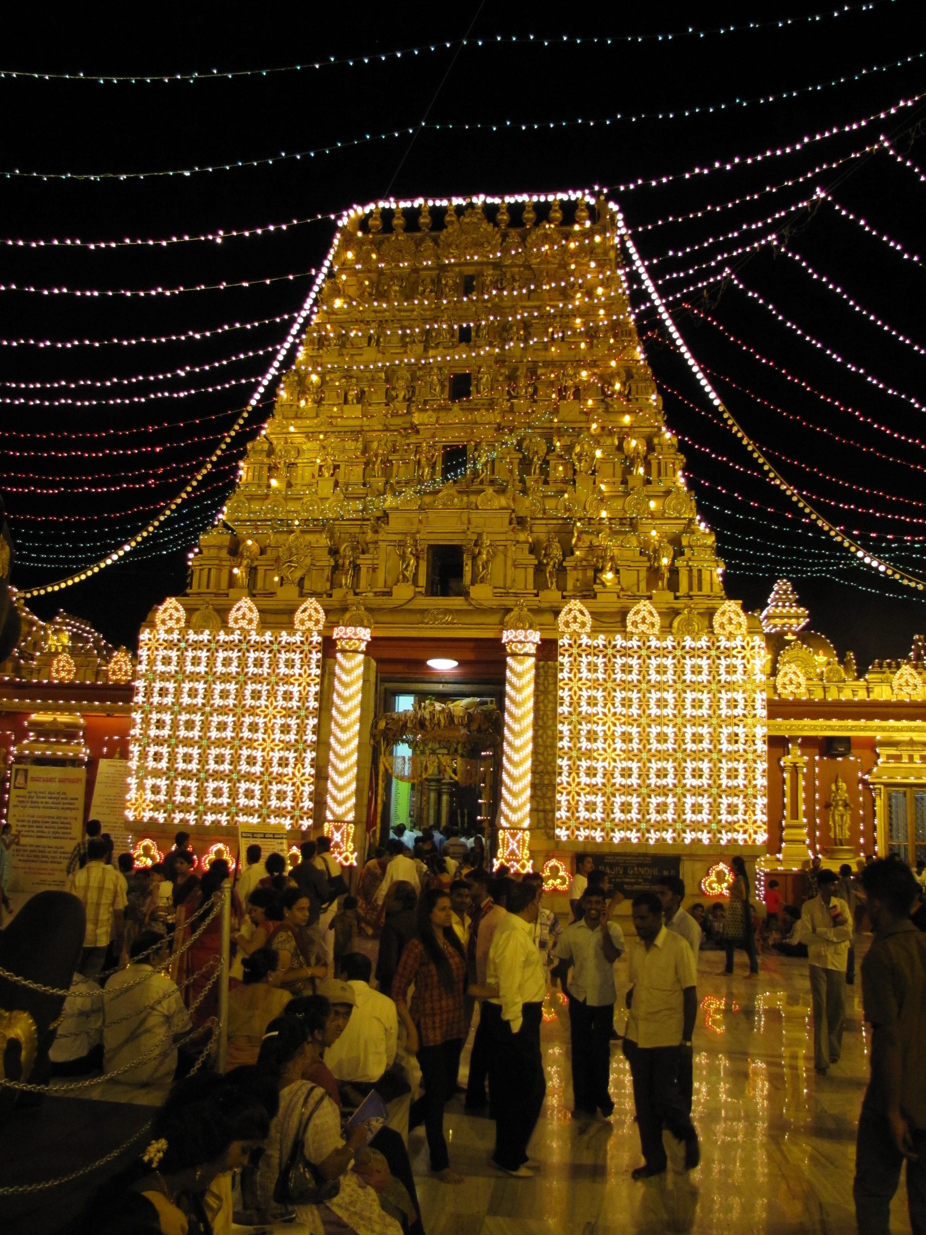 Kudroli Gokarnath Temple